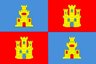 Bandera de Villacastín, en Segovia (España)